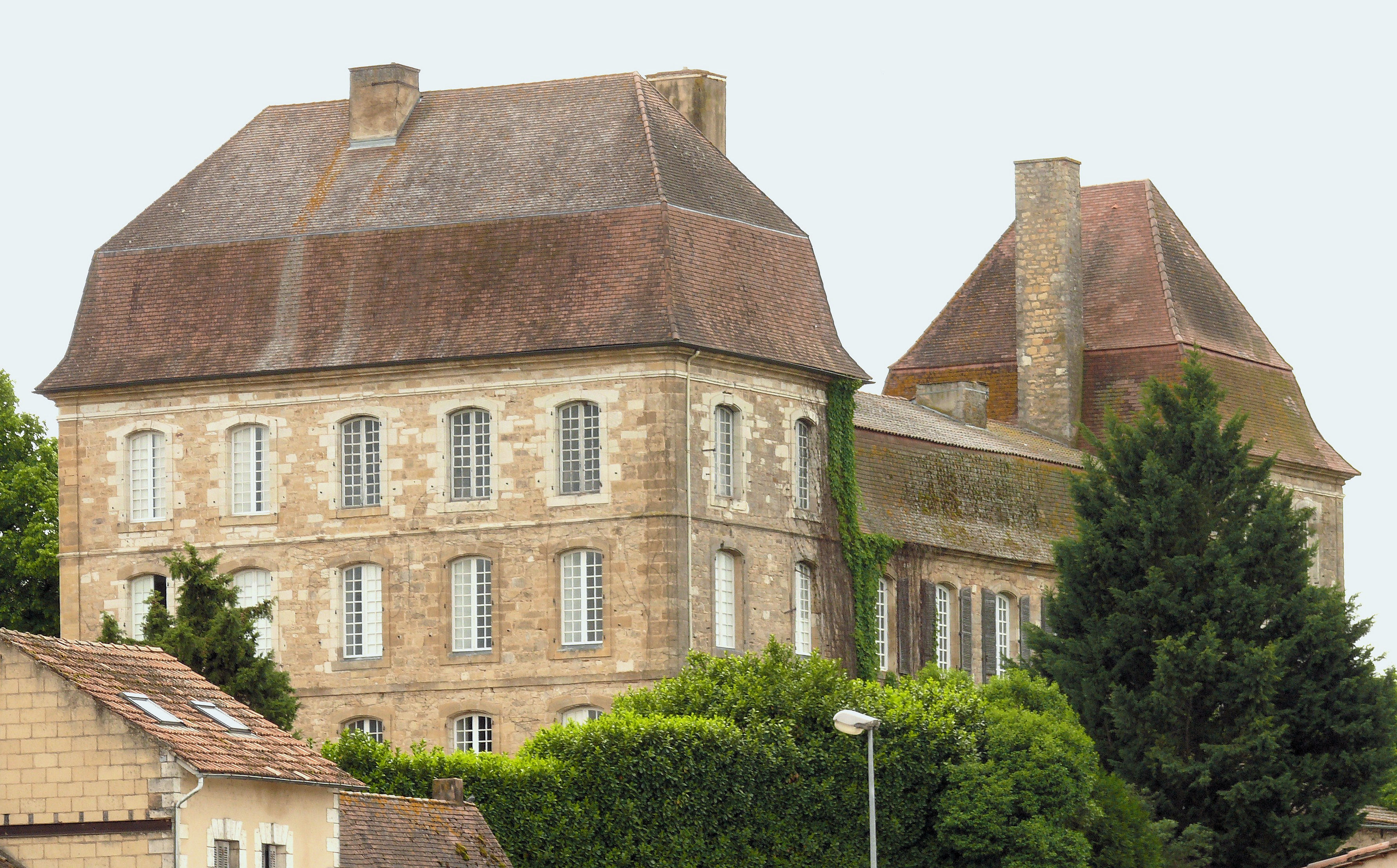 Siorac-en-Périgord - Château